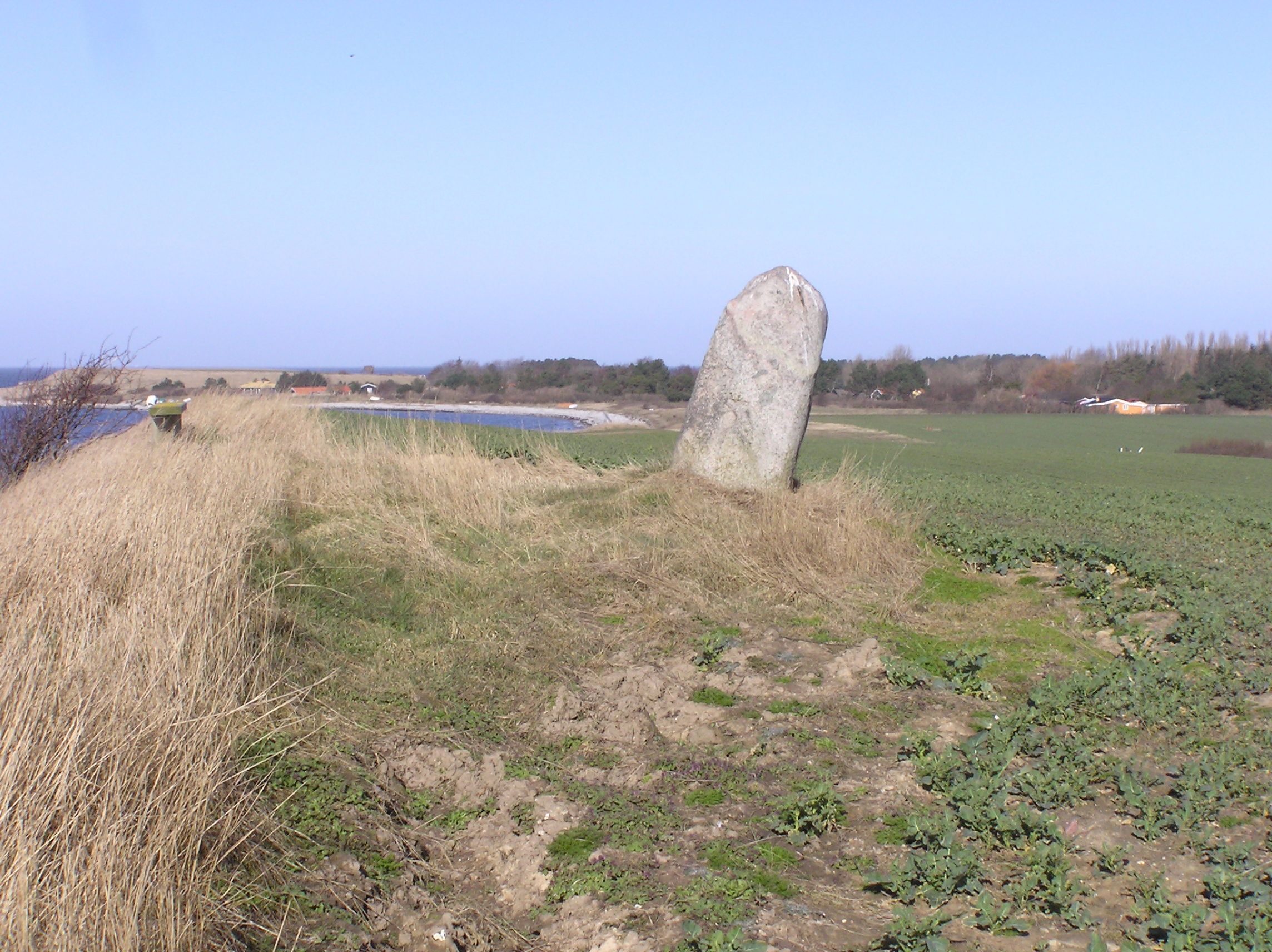 Danmark Sjælland Seierø BautasteinDansk: Bautasten ved kysten sydøst for Kyllingegård på Sejerø